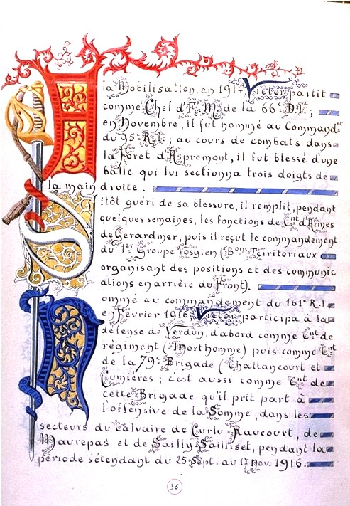 Photographie de la page 36 par le Chevalier Henri Goybet du livre de famille du général de Division Mariano Goybet, son arrière grand père .rédigé de 1898 à 1931 retraçant l'histoire de sa famille. Oeuvre de plus de 200 pages numérotées sur parchemin avec très belles enluminures consultable aux archives de Savoie cote Ij 288. Cette image retrace une partie de la carrière du frère de Mariano Goybet, le général de division Victor Goybet